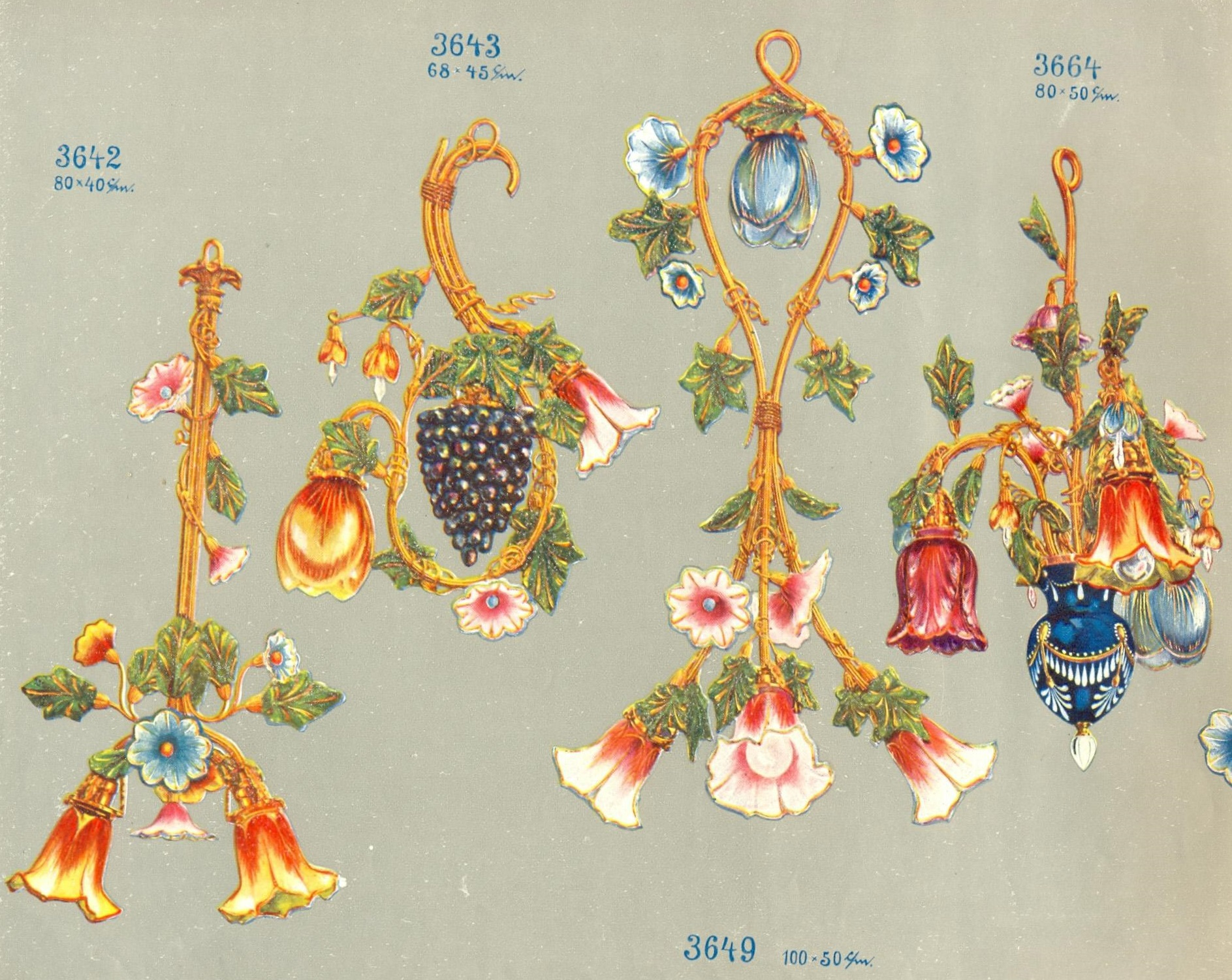 Elias Palme (from export catalog)